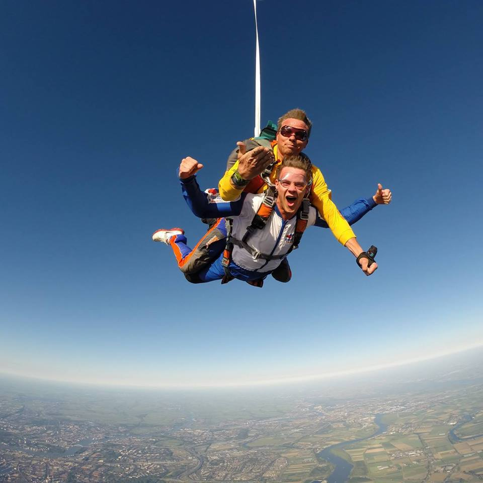 Luuk Skydive